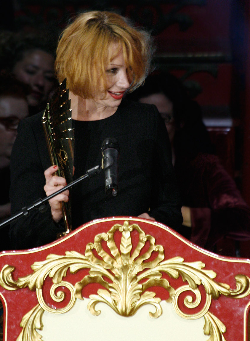 Birgit Minichmayr, ausgezeichnet mit dem Publikumspreis, während der Verleihung des Nestroy-Theaterpreises 2009 (Circus Roncalli auf dem Wiener Rathausplatz).